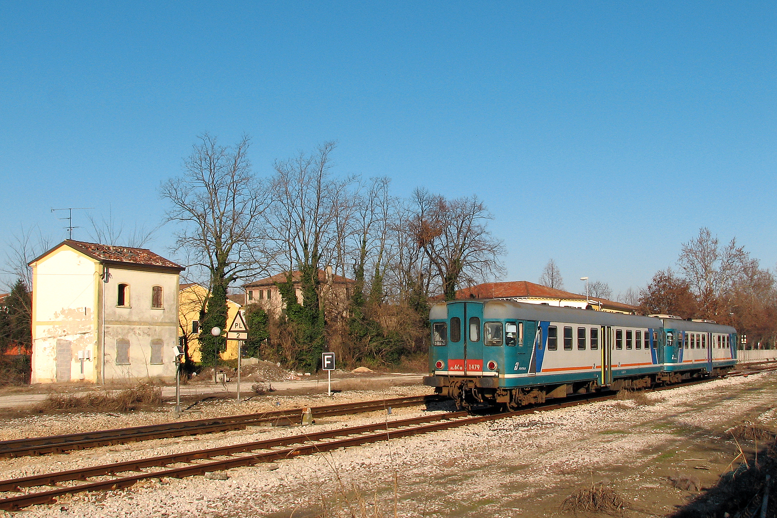 Due ALn 668.1400 (in primo piano la 1479) di Trenitalia in sosta a Piove di Sacco.